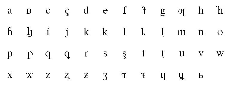 Kabarda latin alphabet (1930s).